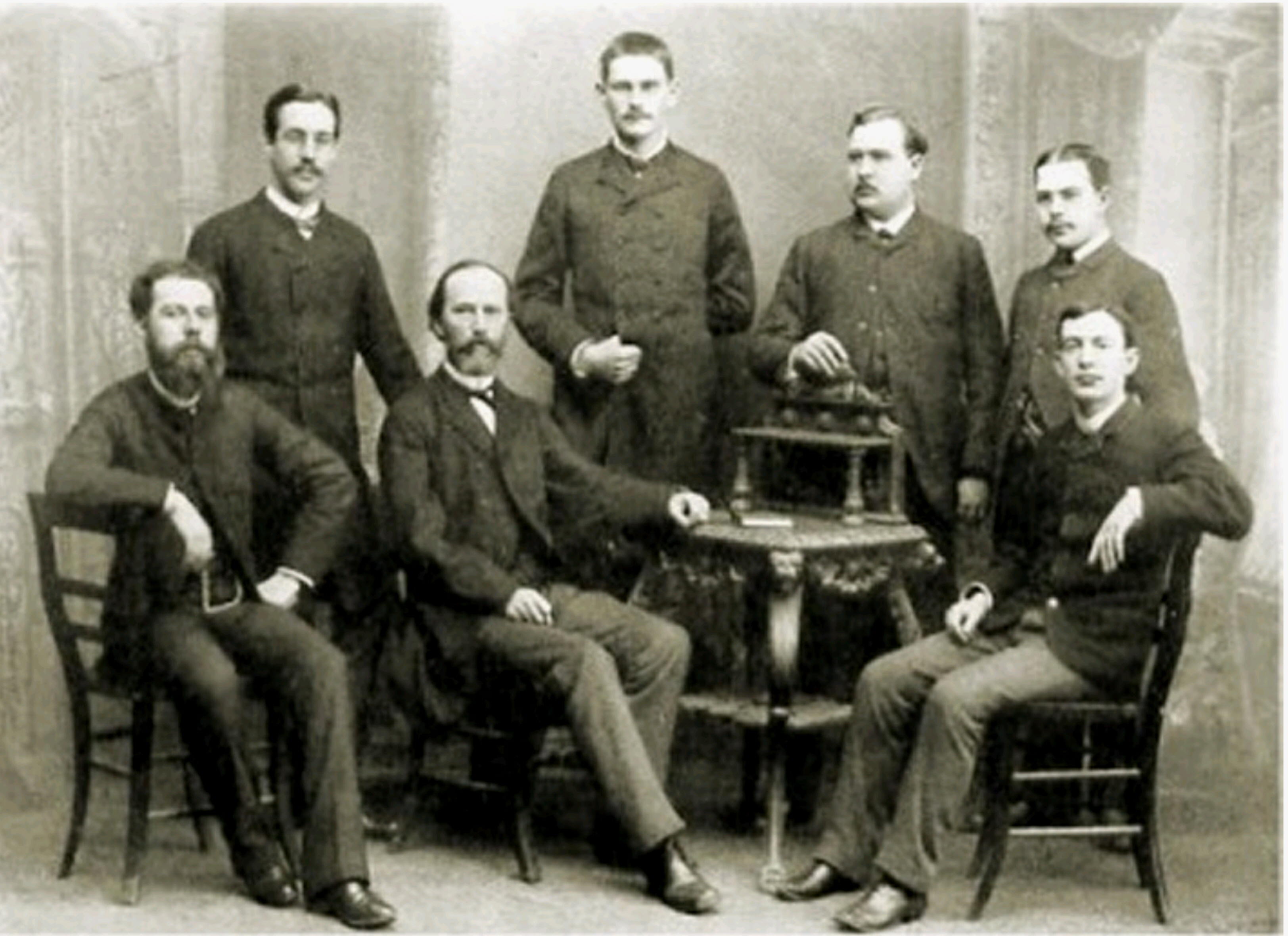 Physikalisches Institut der Universität Würzburg - Arbeitskreis F. Kohlrausch und Doktoranden im Wintersemester 1886/1887 stehend vlnr: Adolf Heydweiller (* 15. Januar 1856 in Krefeld; † 31. Dezember 1926 in Gauting) Ewald Rasch Svante Arrhenius (* 19. Februar 1859 auf Gut Wik bei Uppsala; † 2. Oktober 1927 in Stockholm), research tour to Würzburg 1886-1887 Walther Nernst (* 25. Juni 1864 in Briesen; † 18. November 1941 in Zibelle) sitzend vlnr: Palazzo (? Polozzo ?)(wahrscheinlich Wilhelm Kohlrausch (* 14. Mai 1855 in Marburg; † 16. April 1936 in Hannover)) Friedrich Kohlrausch (* 14. Oktober 1840 in Rinteln; † 17. Januar 1910 in Marburg) Samuel Sheldon (* 8. März 1862 in Middlebury, Vt.; † 4. September 1920 in Brooklyn), Doktorand 1887-1888; [1][2]